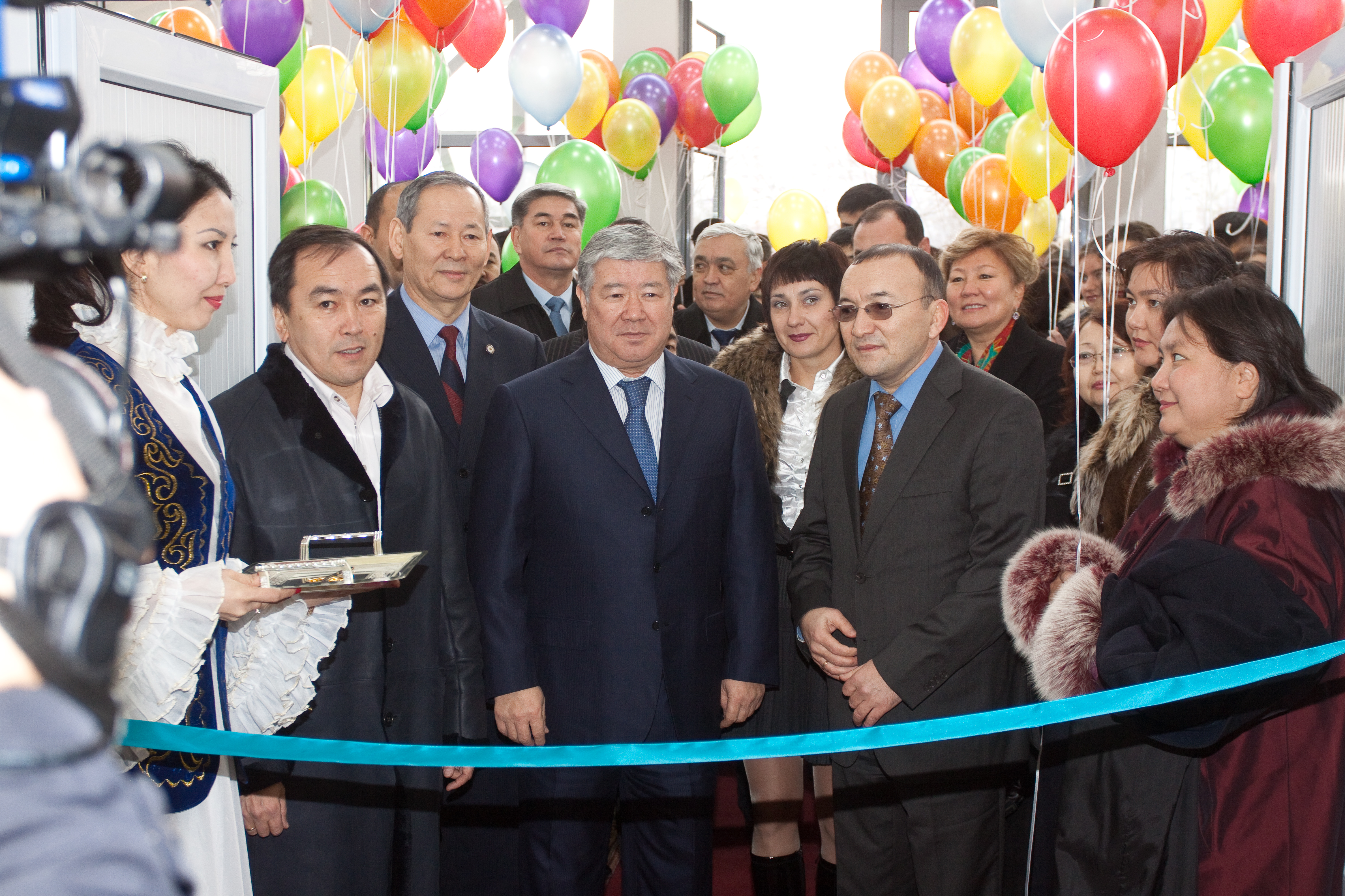 Открытие спорткомплекса с участием акима Алматы Ахметжана Есимова.